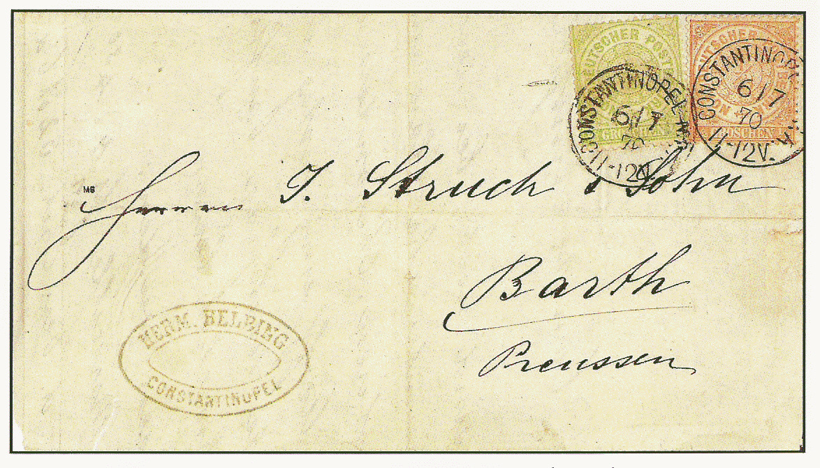 Brief von 1870, abgestempelt beim Deutschen Postamt in Konstantinopel eingescannt W.Steven 10:21, 11. Dez. 2006 (CET) 2006